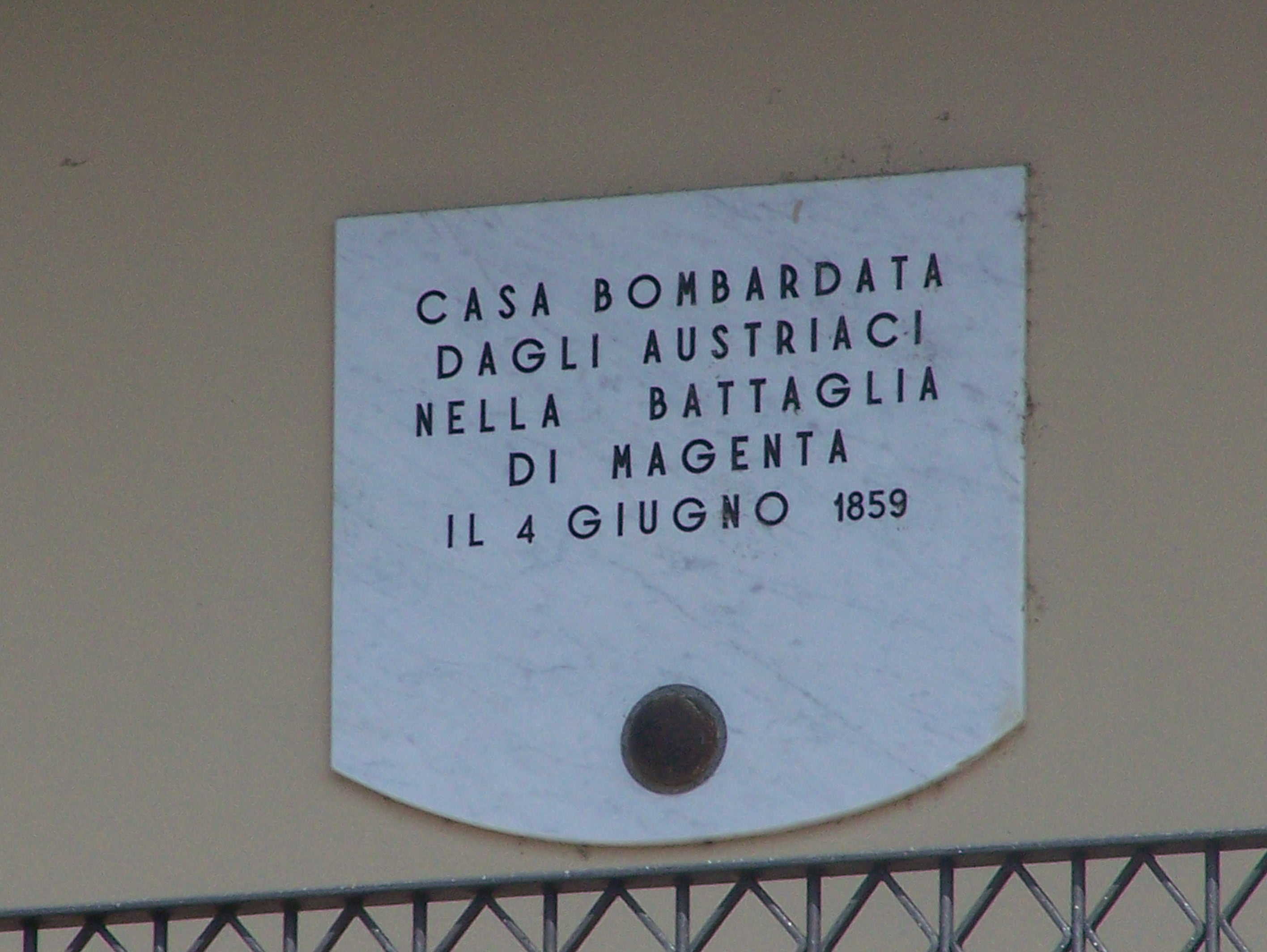 Lapide con l'iscrizione "Casa bombardata dagli austriaci nella Battaglia di Magenta - 4 giugno 1859" a Boffalora sopra Ticino (MI) - Italy